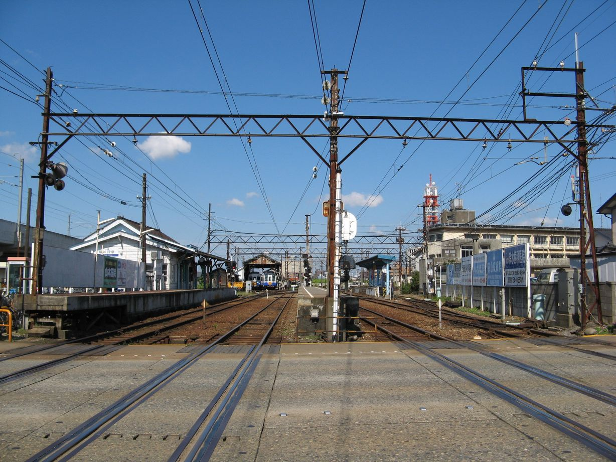 福井口駅 踏切から構内を望む